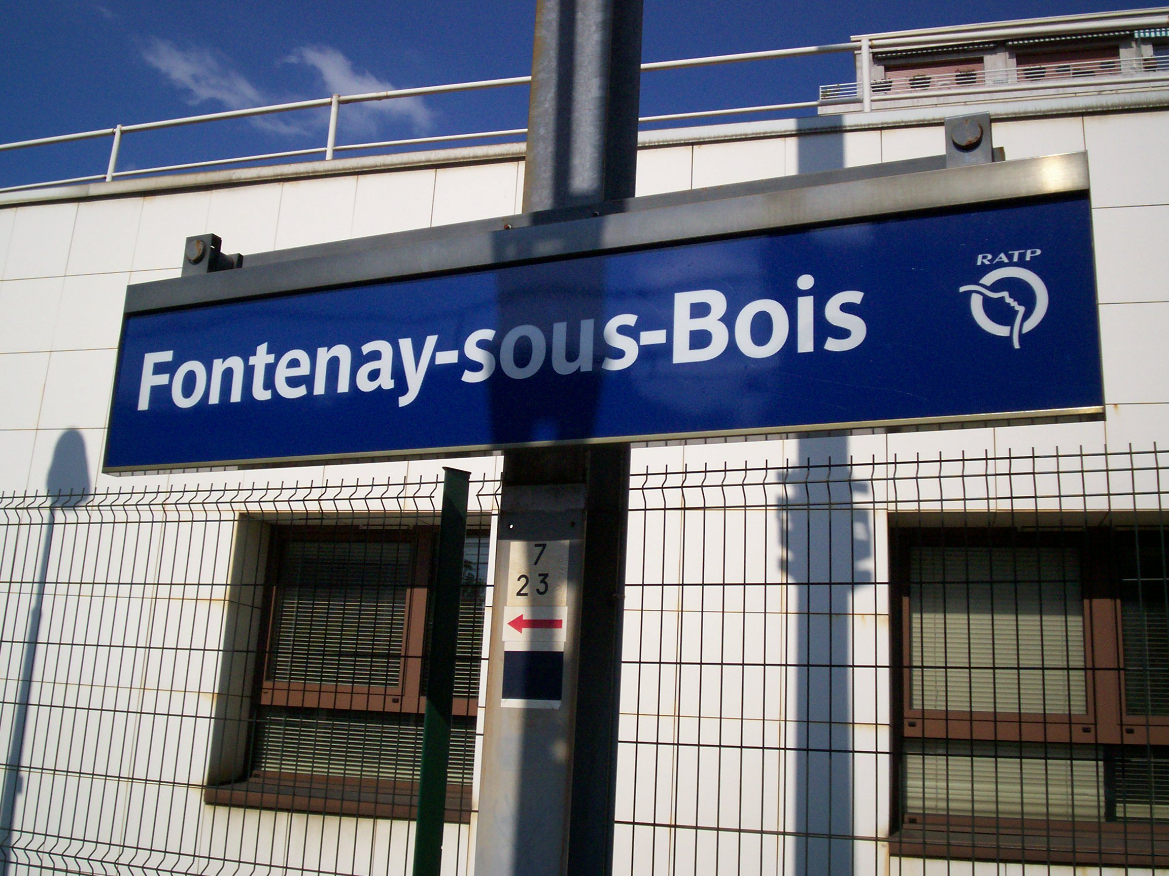 Gare de Fontenay-sous-Bois